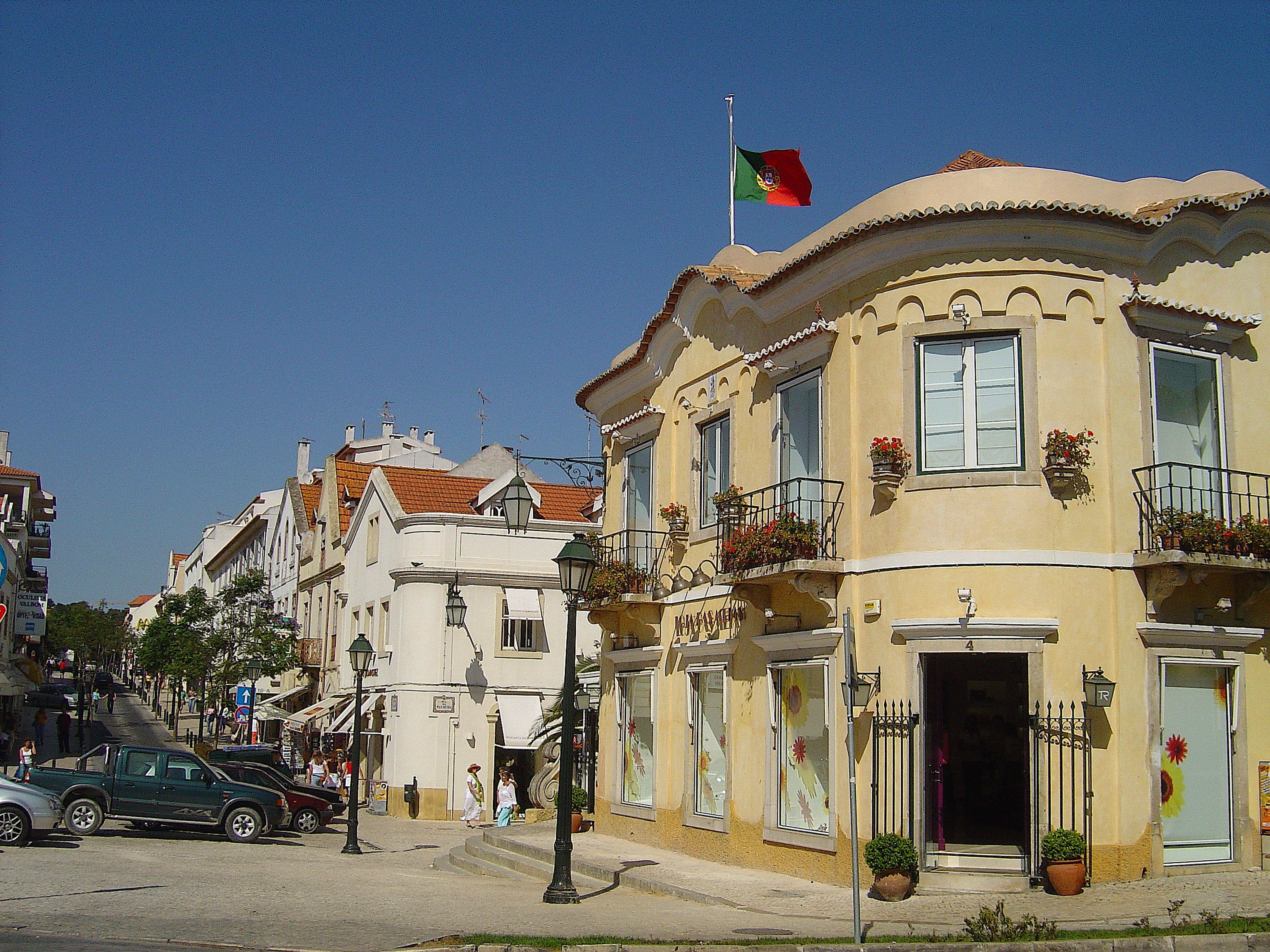 Cascais (Portugal)